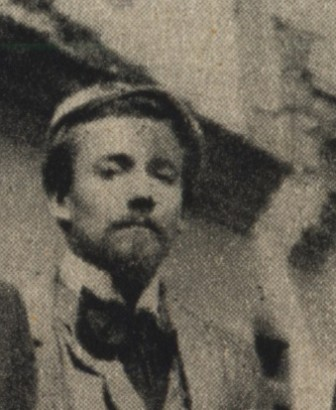 Augustin Satra (1877 - 1909), Český malíř.